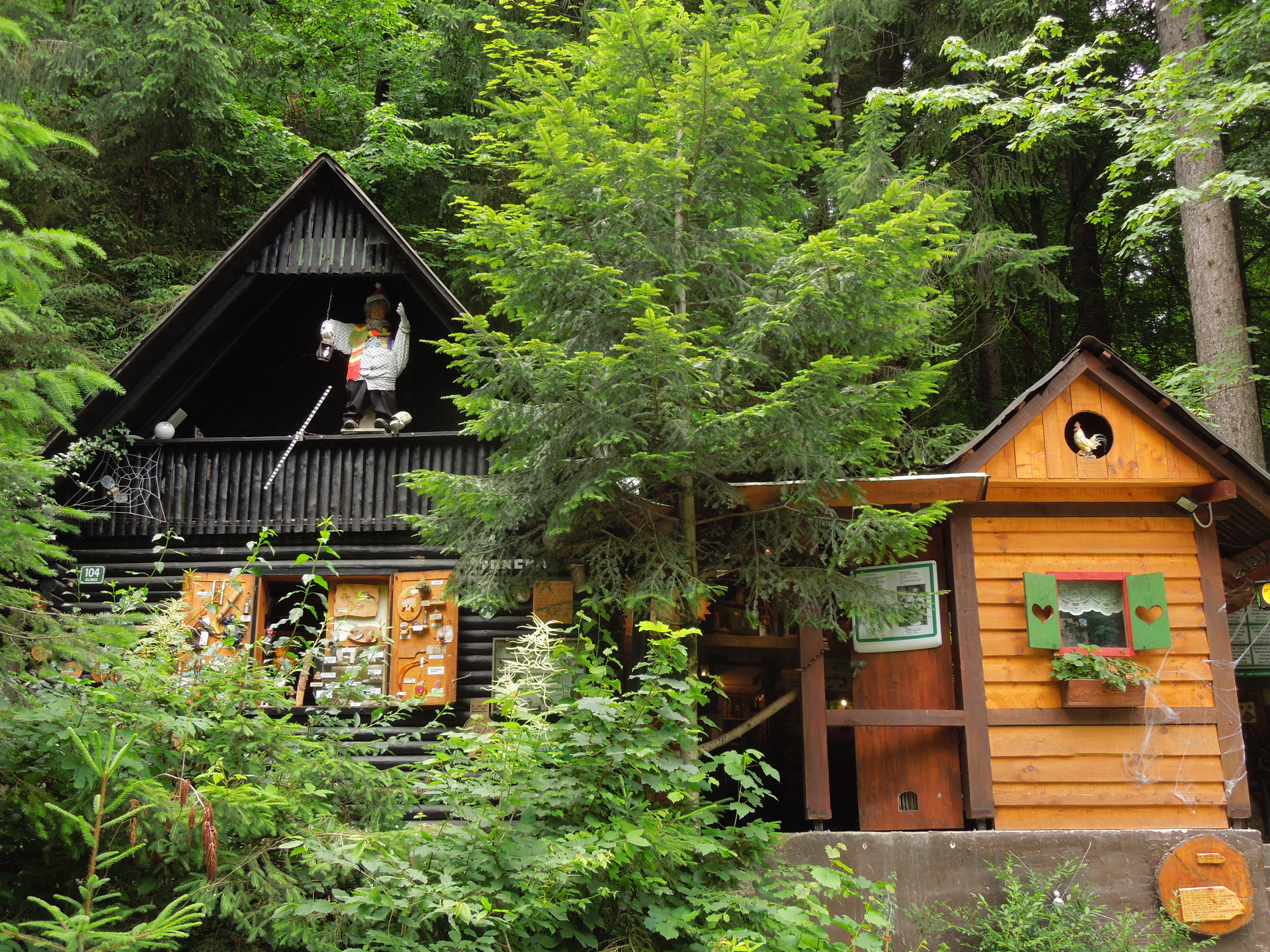 Prva pravljična dežela pravljic in domišljije v Sloveniji